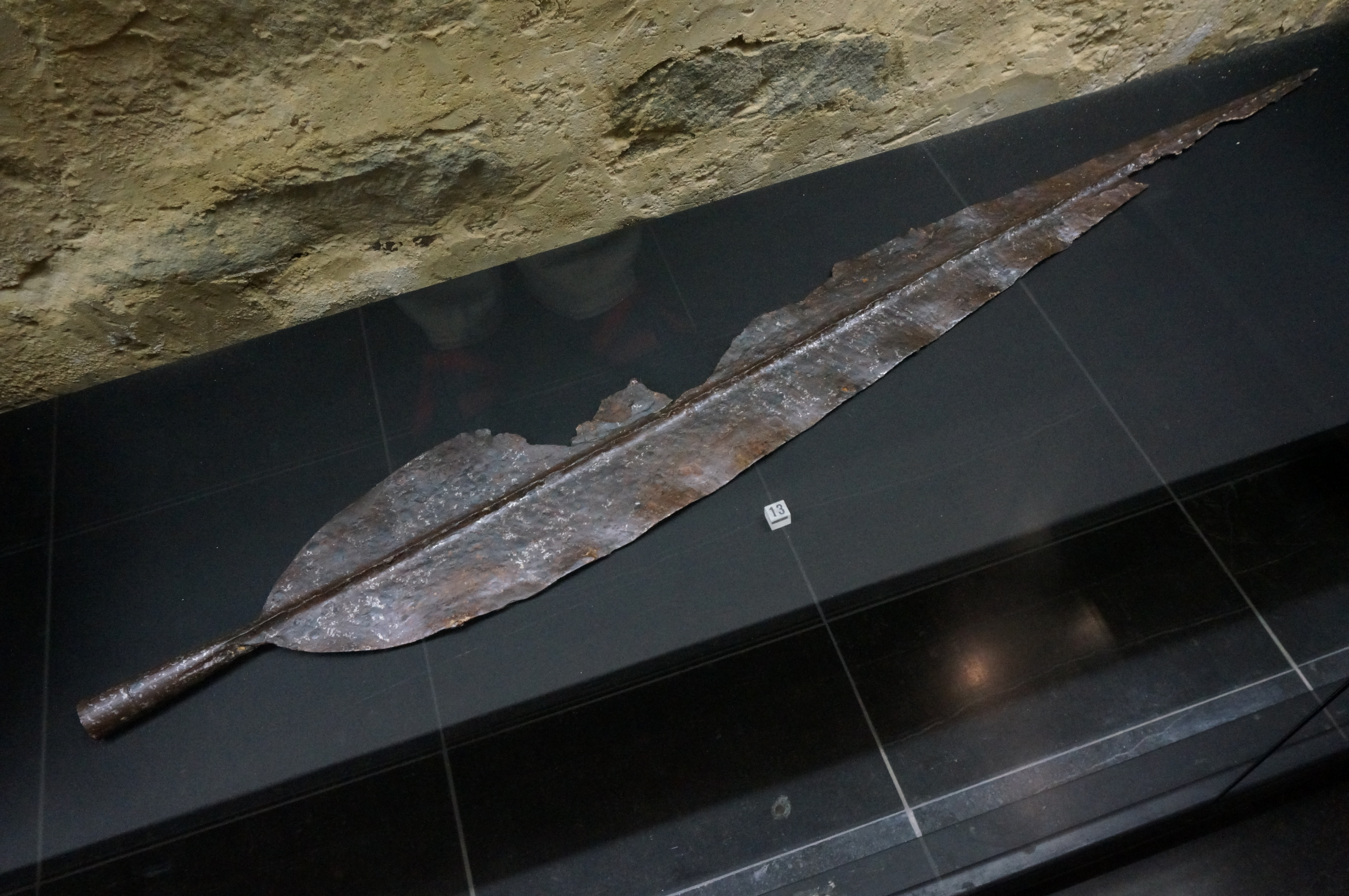 présenté au Musée de l'Ardenne.